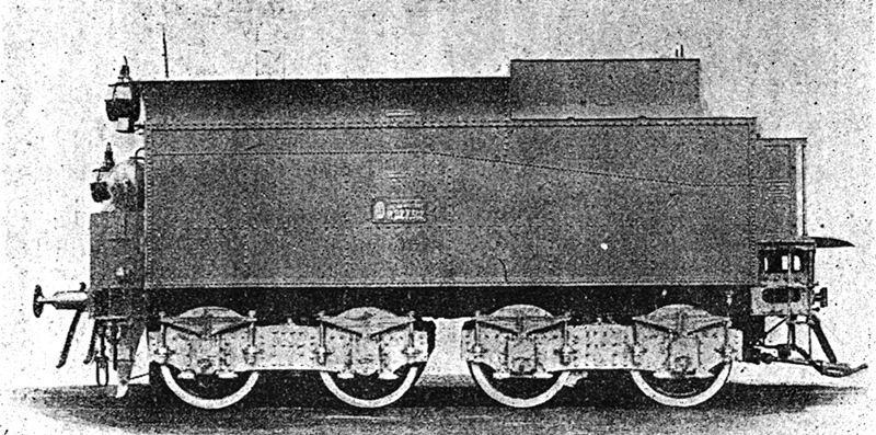 A MÁV R327.502 pályaszámú szerkocsija